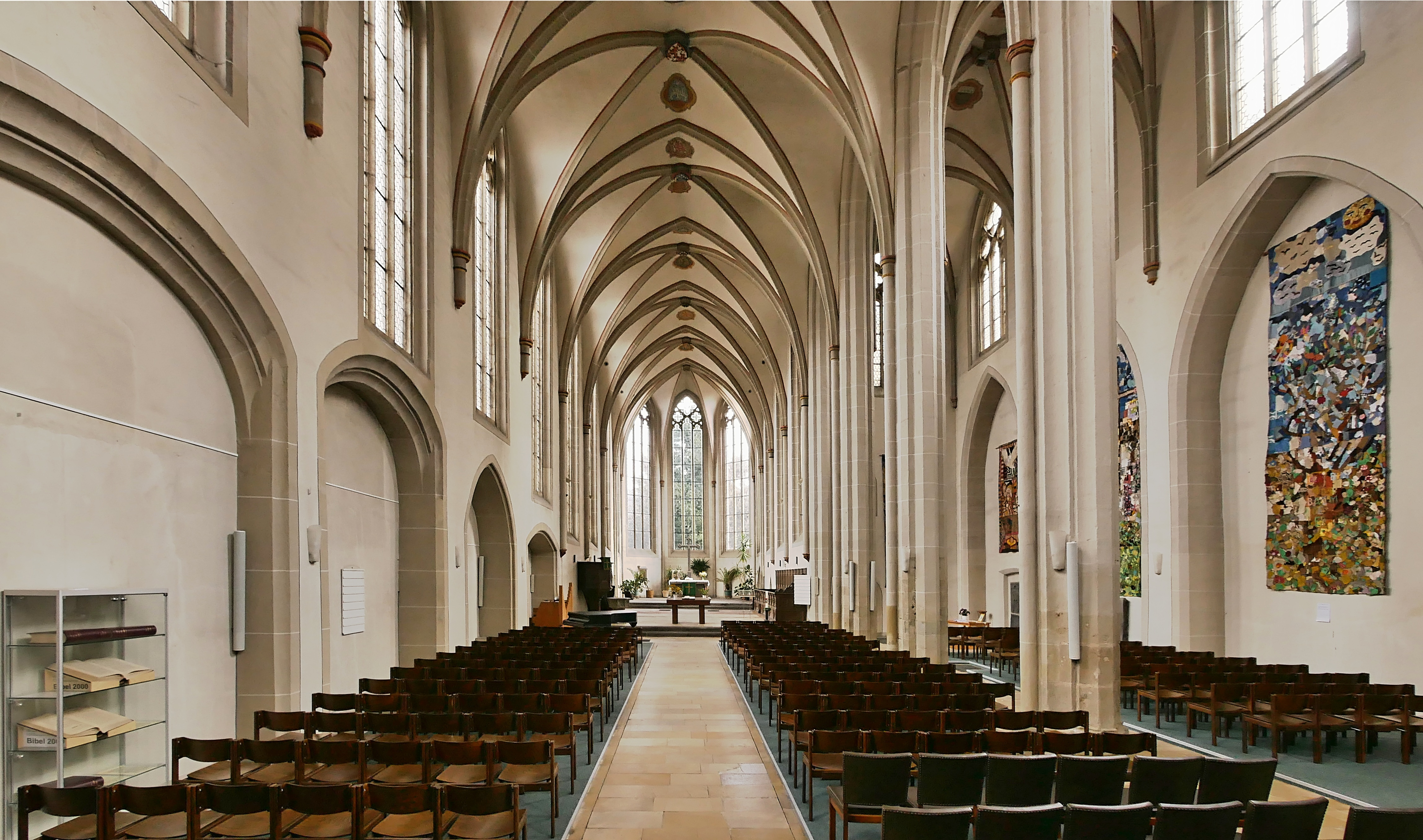 Evangelische Christuskirche Andernach